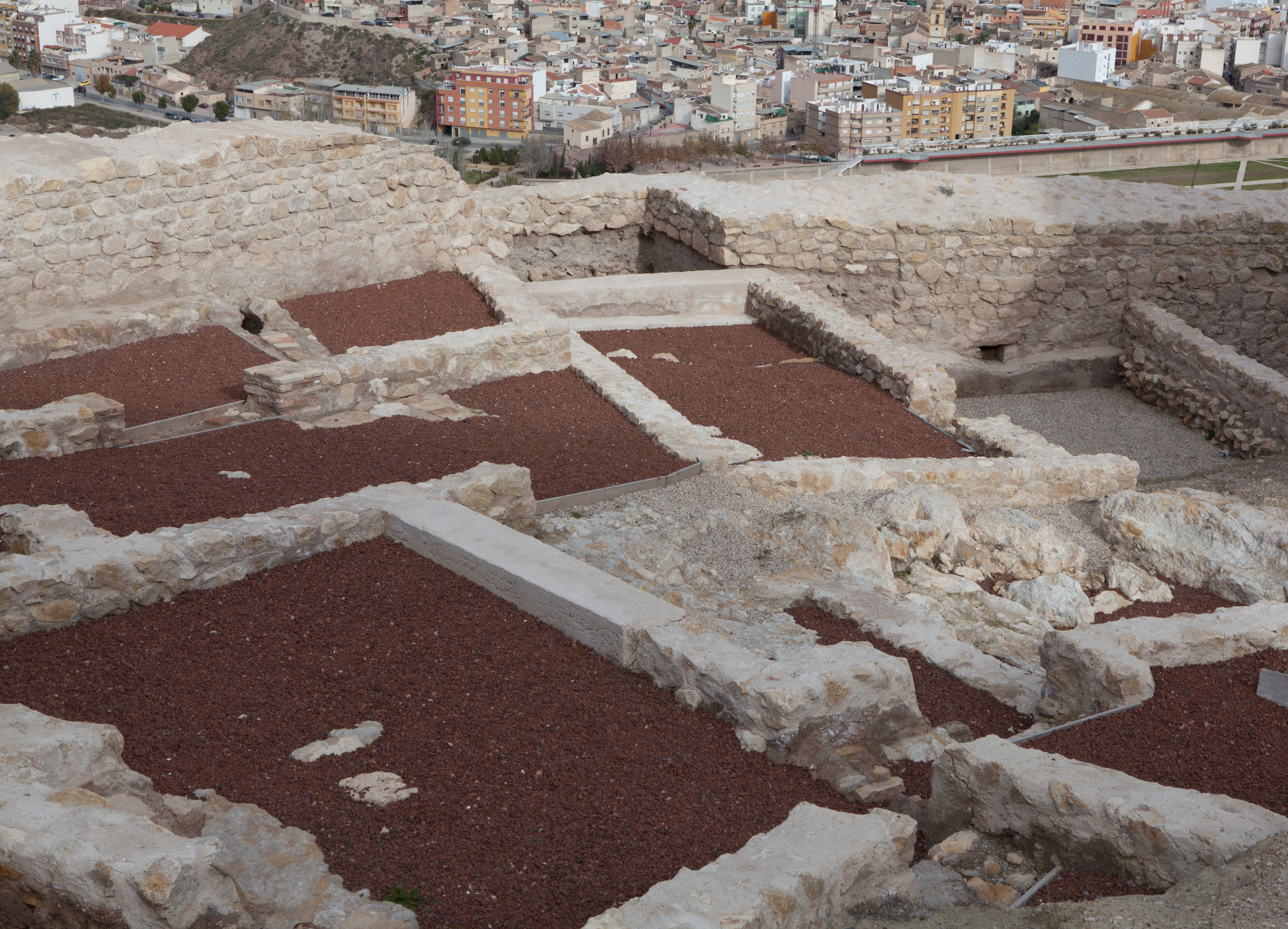 שרידי הרובע היהודי מימי הביניים שהתגלו בחפירות בשנת 2010